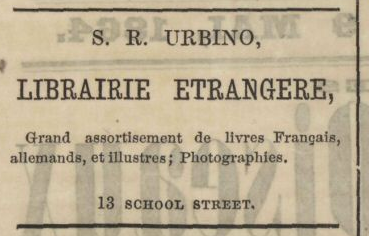 Advertisement, Boston, Massachusetts. Detail from theatre programme: "Tremont Theatre. Theatre Francais de New York. ... Mercredi, 9 Mai, 1864. Les petits ouiseaux ou Le Coeur et l'argent. Comedie en trois actes ... Intermede. Le vieux braconnier ... A la demande generale. La Diplomatie du Menage comedie-proverbe en un acte ... Mudge & Fils, imp."